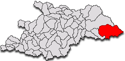 Categorie:Hărţi ale judeţului Maramureş